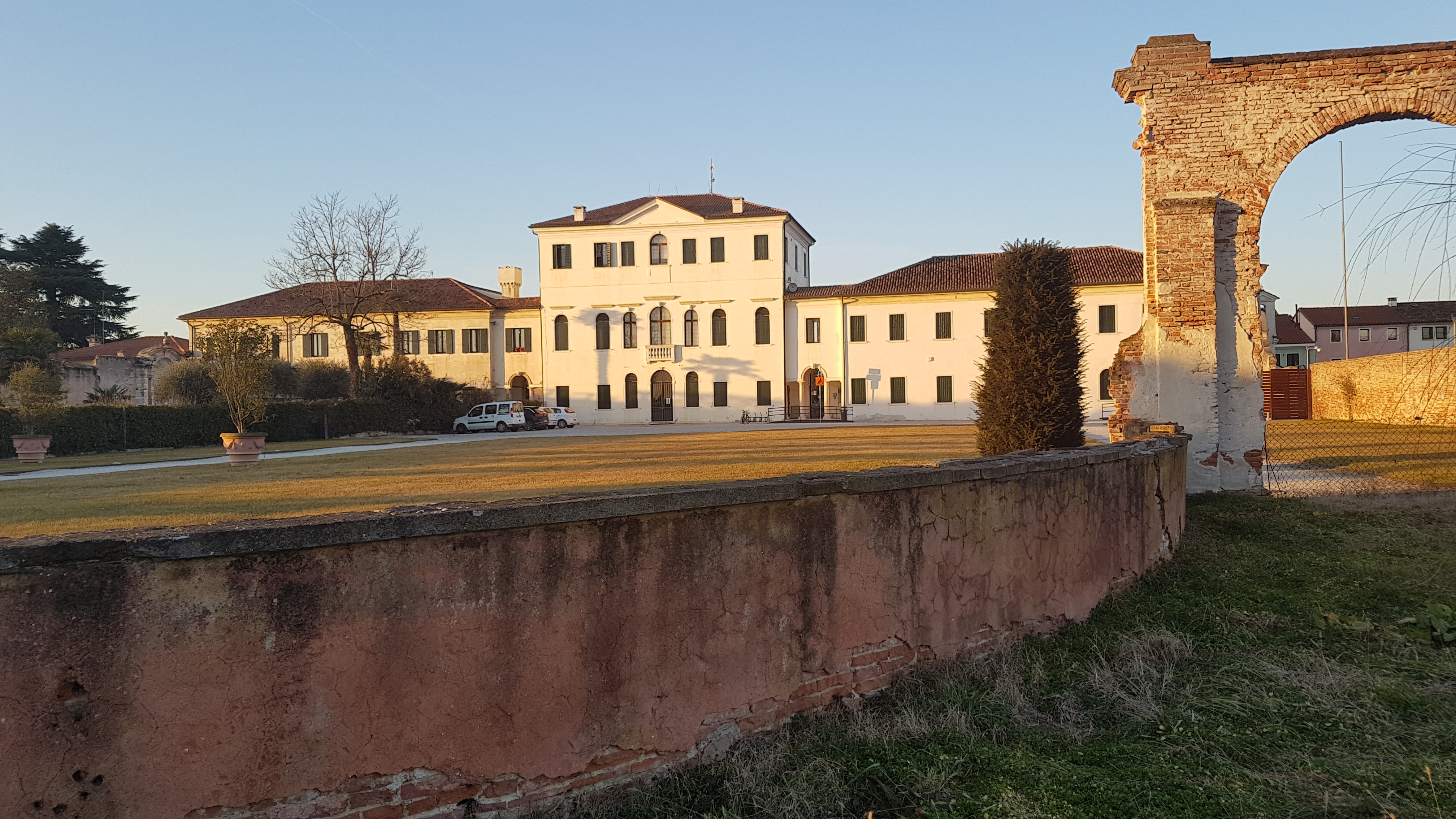 Il retro e il giardino di Villa Baglioni in un pomeriggio soleggiato.